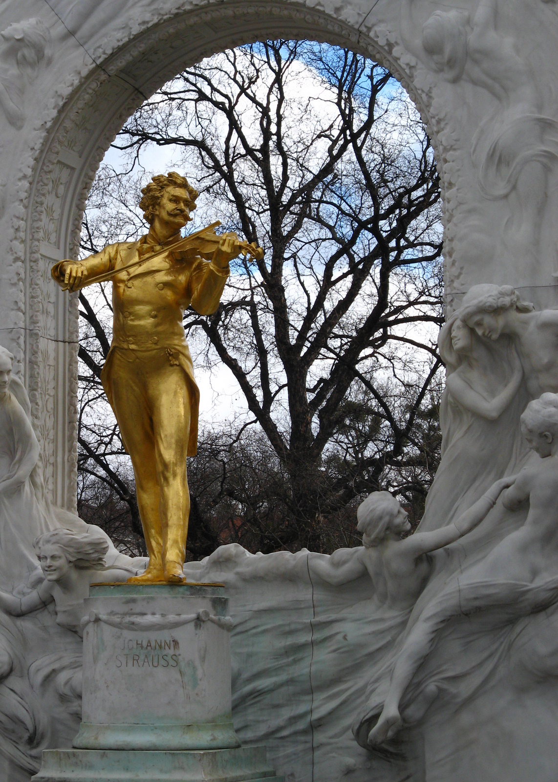 Vienna